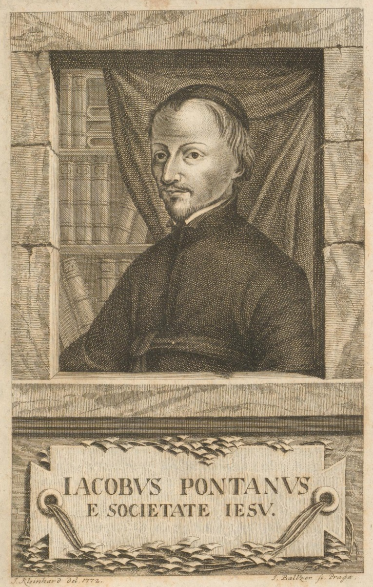 Jakub Spanmüller - jezuita